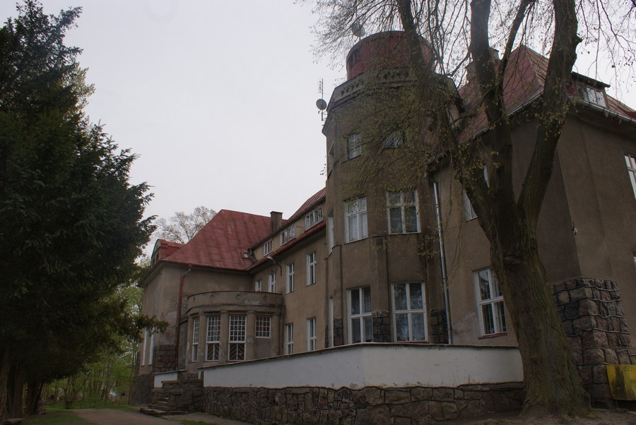 Dwór w Rąbinie